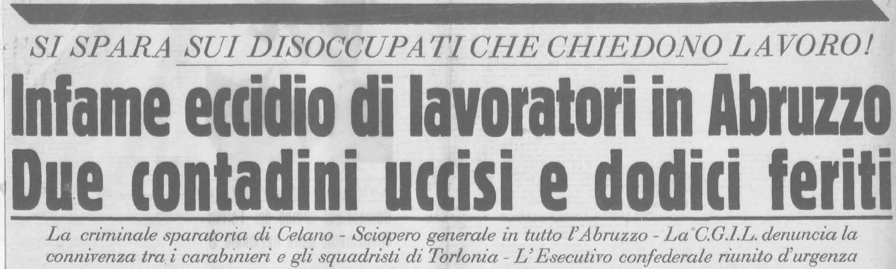 Titolo giornale Eccidio di Celano